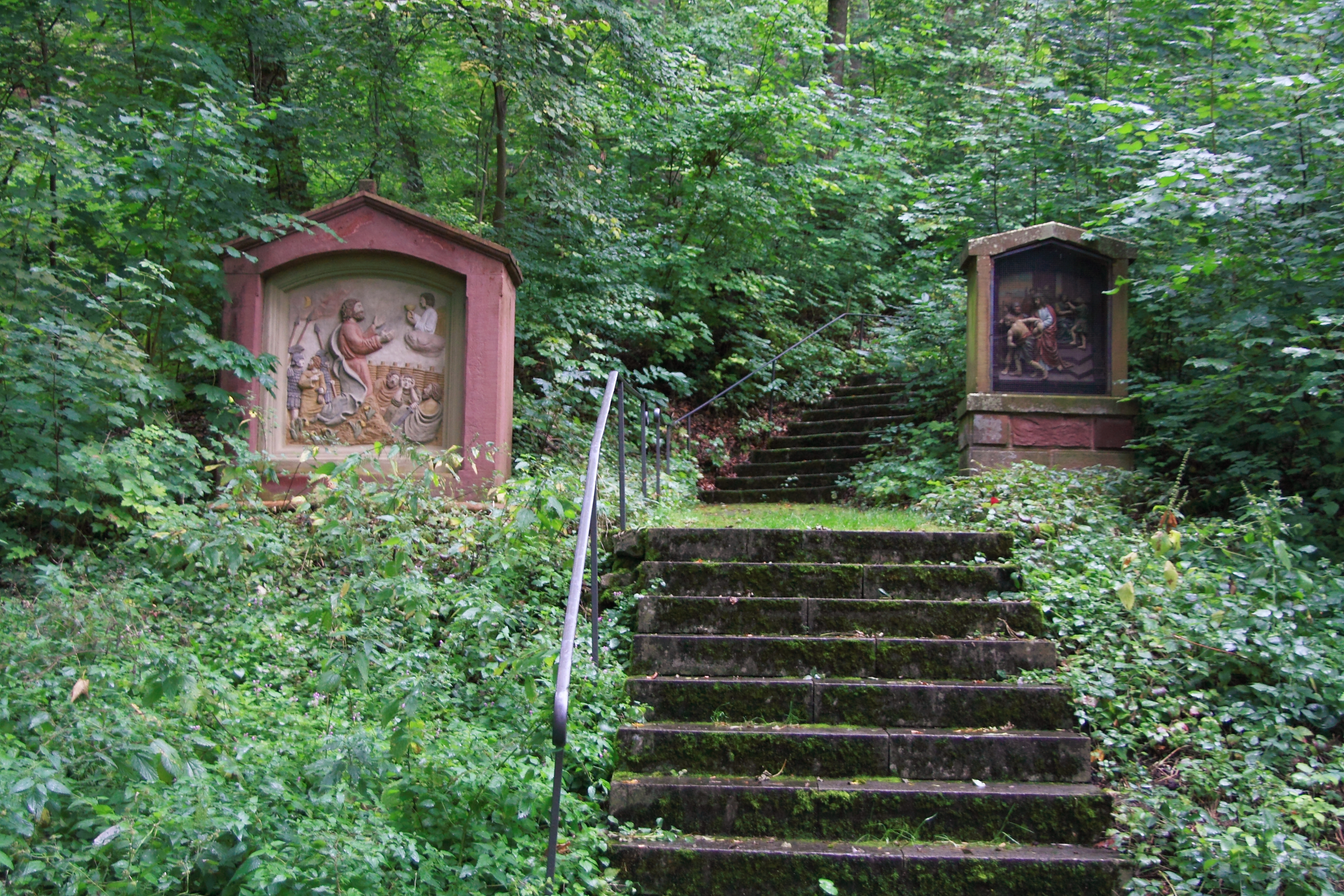 Kalvarienbergstationen am Kreuzweg der Bergkirche Laudenbach.